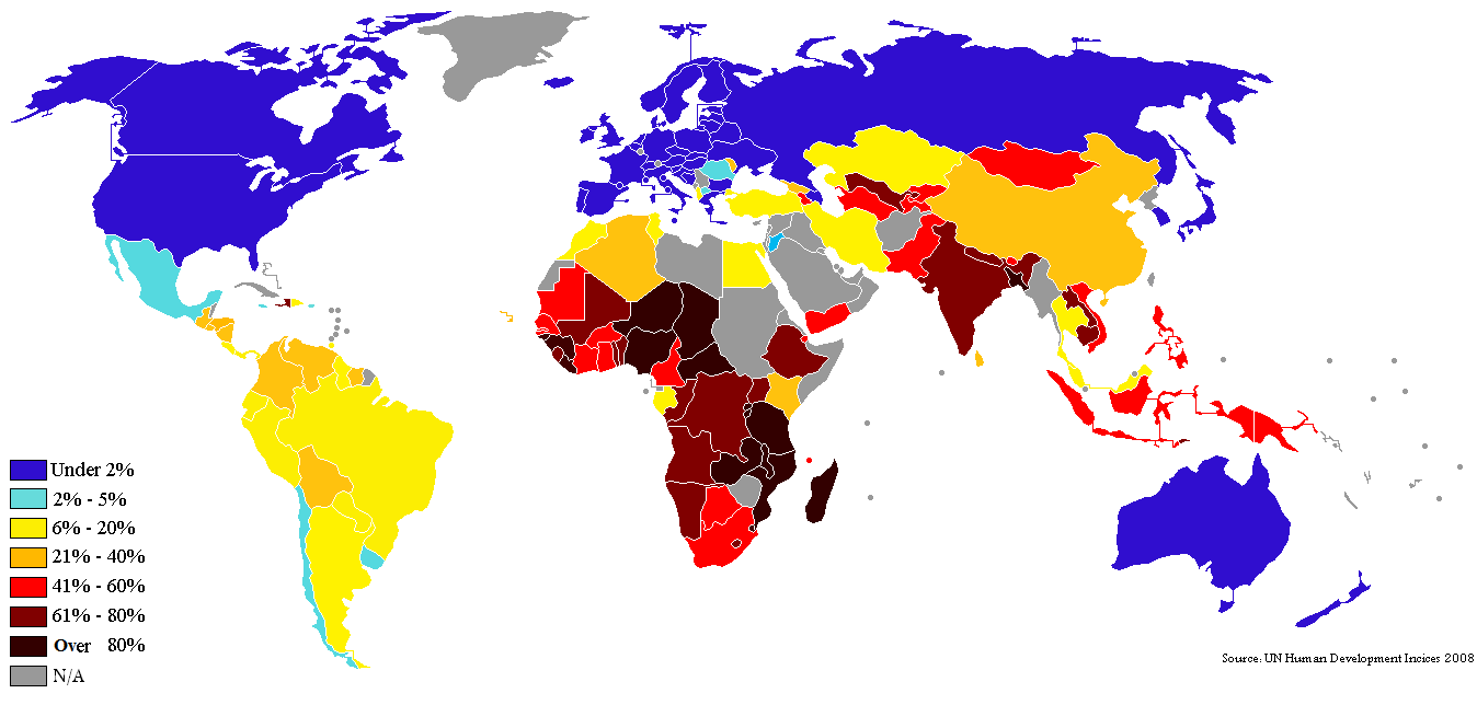 Porcentaje de la población viviendo con menos de dos dólares al día en 2007-2008